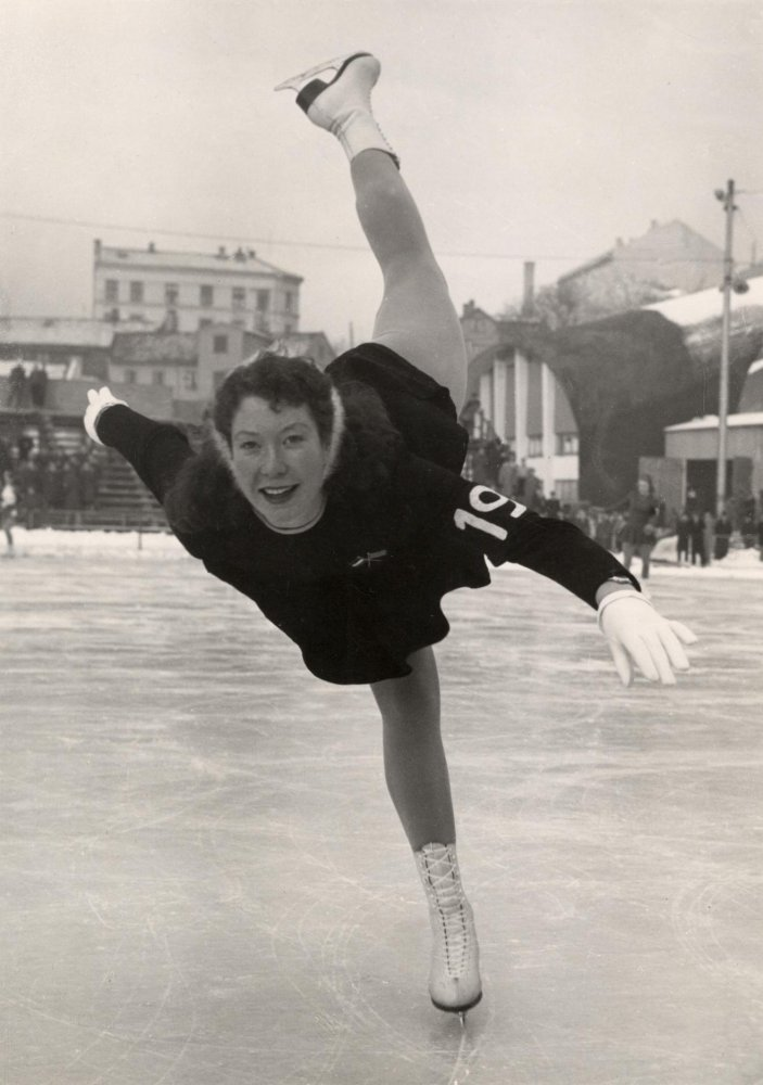 Lidy Stoppelman oefent voor de Olympische Spelen in het Jordal Amphi stadion in Oslo, Noorwegen 17 februari 1952.